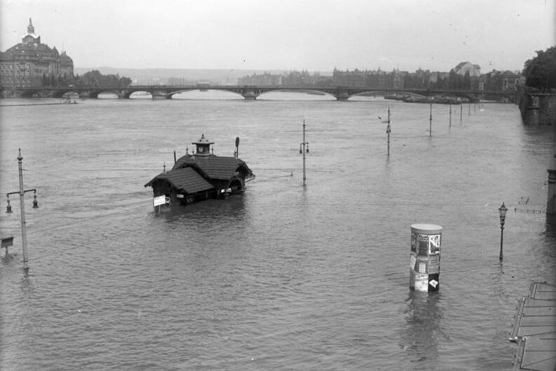 Große Hochwasser-Überschwemmung der Elbe bei Dresden! Blick auf die überschwemmte Uferstraße der Elbe.